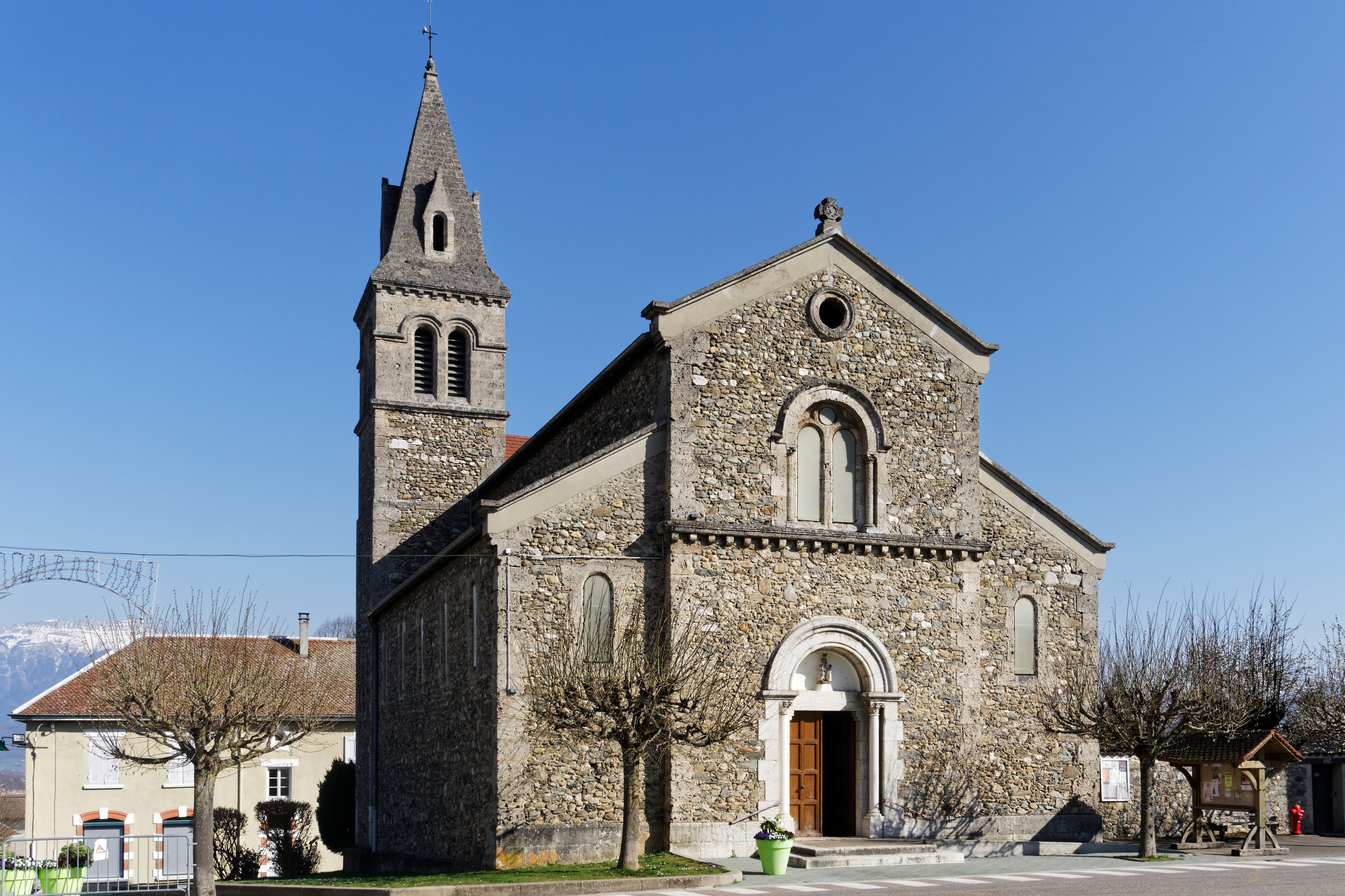 Église Saint-Blaise et Saint-Chrostophe à Saint-Blaise-du-Buis, Isère, France